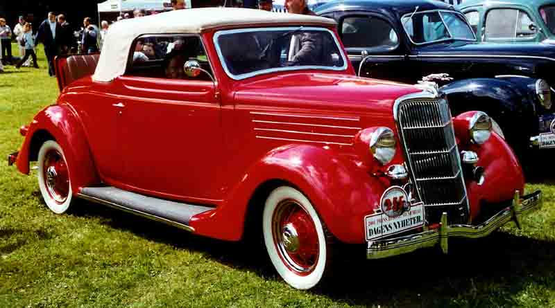 Ford Model 48 760 Cabriolet 1935